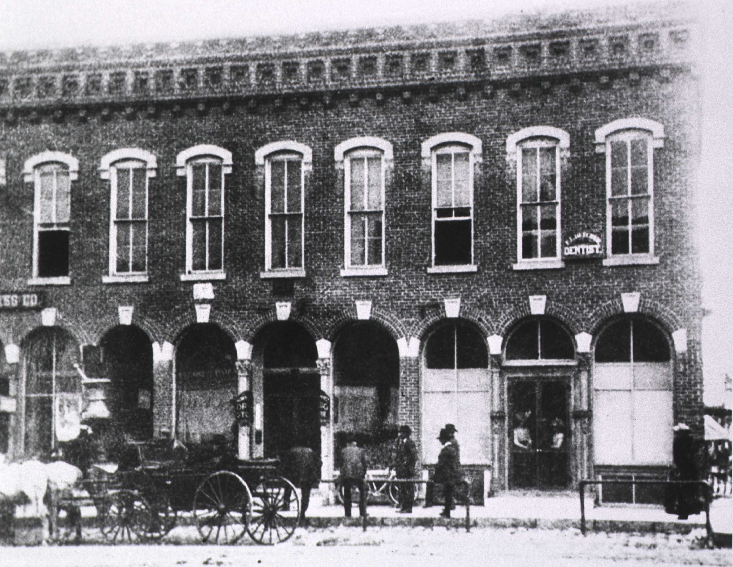 Mayo Clinic and Foundation, Rochester, Minn [graphic] : Exterior view of early office shared by Mayo brothers and their father. photoprint.